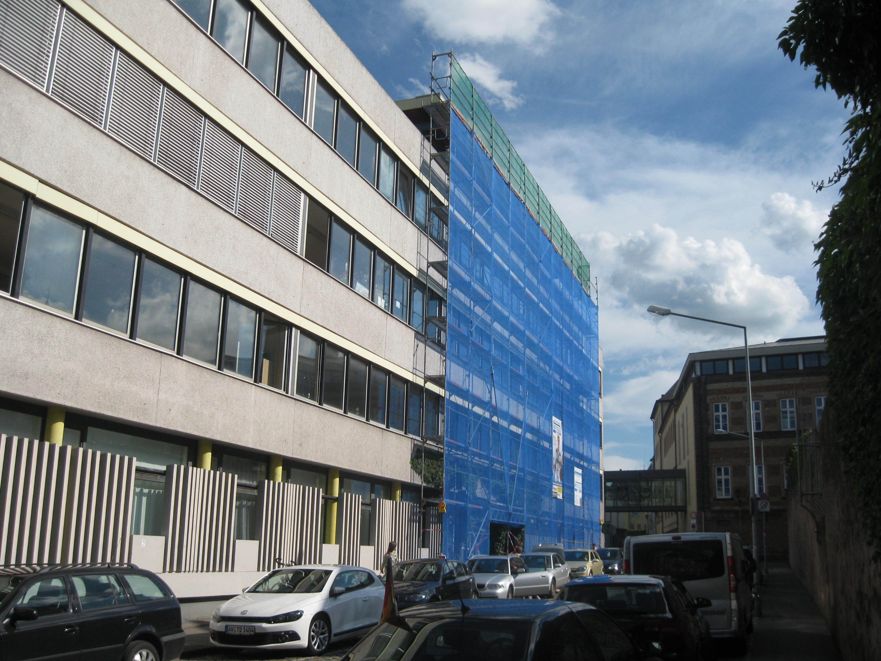 AVG Trier Neubau, Deworastraße